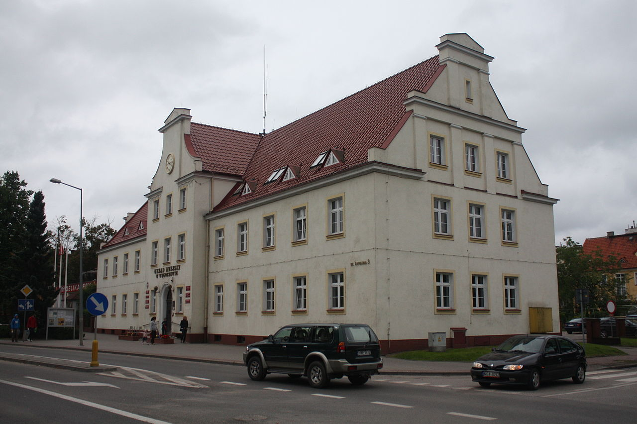 Węgorzewo, ul. Zamkowa 3 - Urząd Miasta This photo of Warmian-Masurian Voivodeship was taken during Wikiexpedition 2012 set up by Wikimedia Polska Association. You can see all photographs in category Wikiekspedycja 2012. The making of this document was supported by Wikimedia Polska.